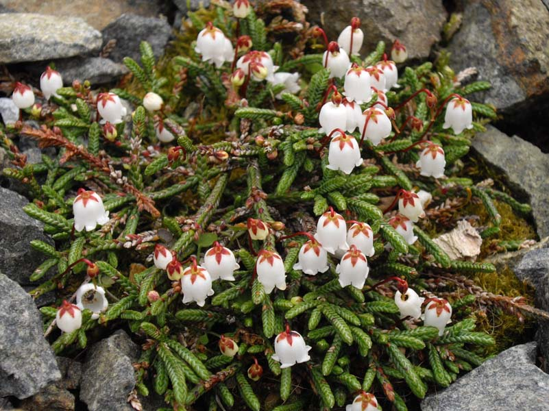 Cassiope lycopodioides 'Jim Lever'